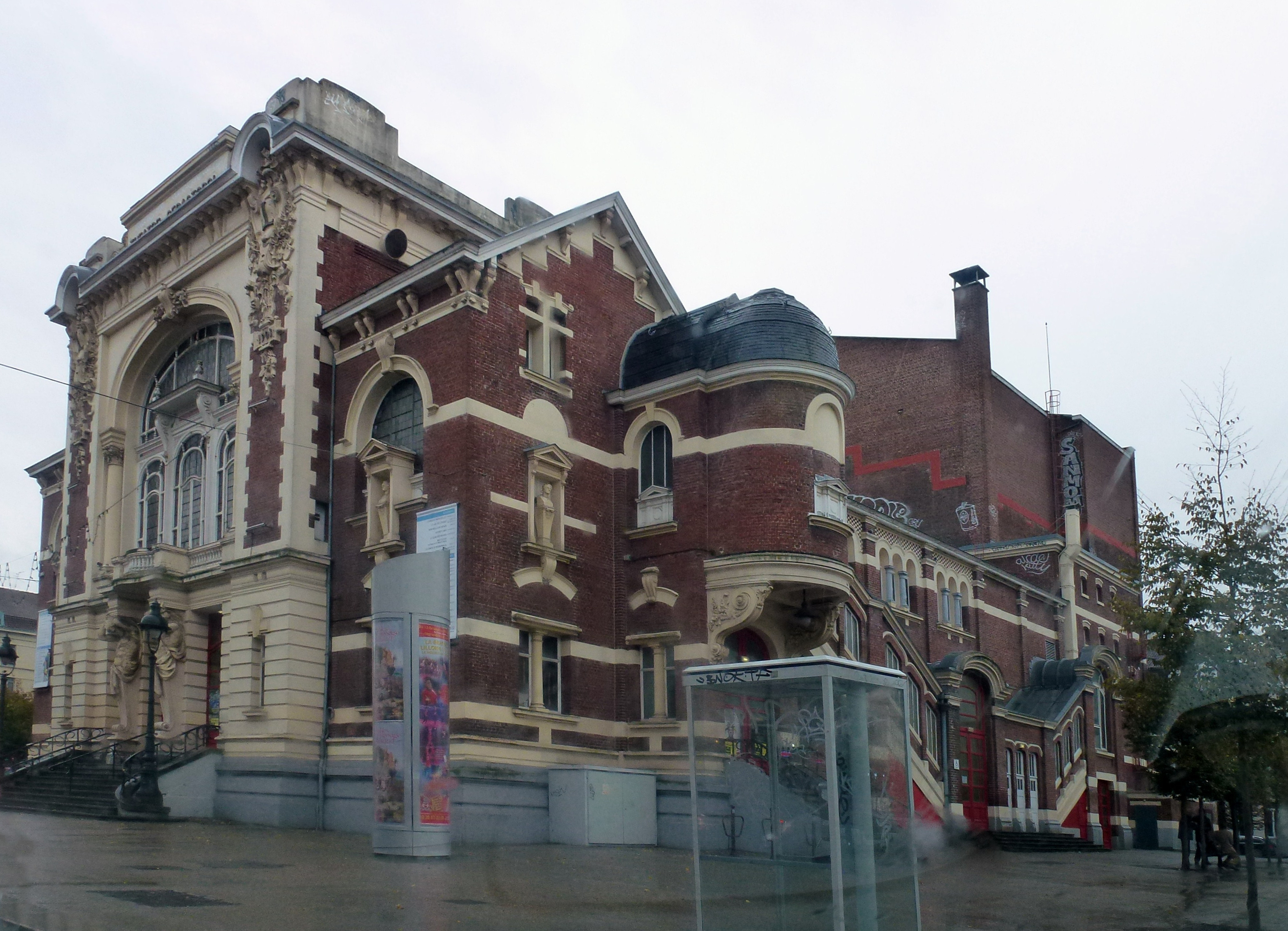 Le Théâtre Sébastopol à Lille Nord